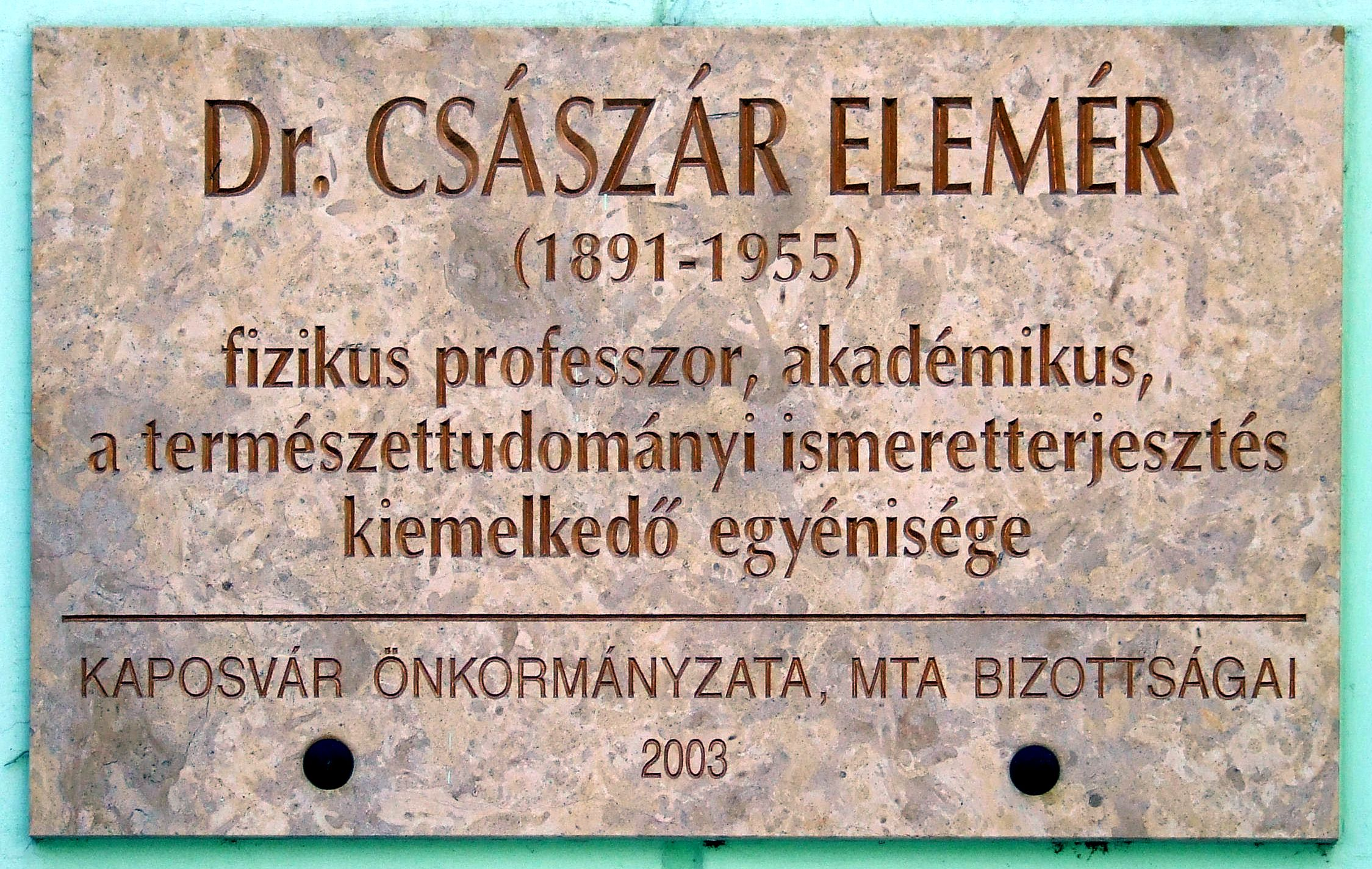 Császár Elemér emléktáblája a Somogy Megyei Tudományos Ismeretterjesztő Társulat kaposvári székházának falán